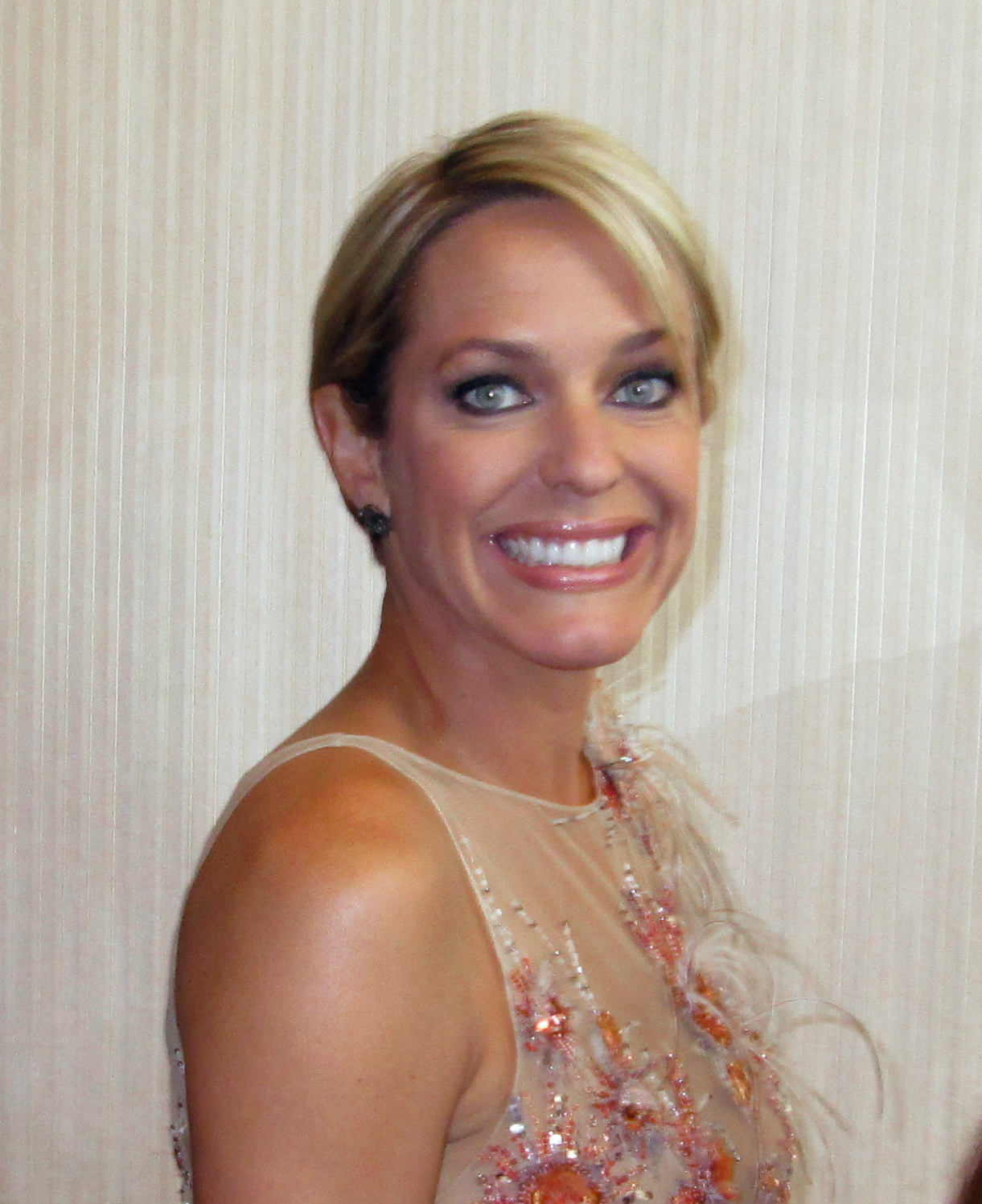 Ari Zucker at 2014 Daytime Emmys